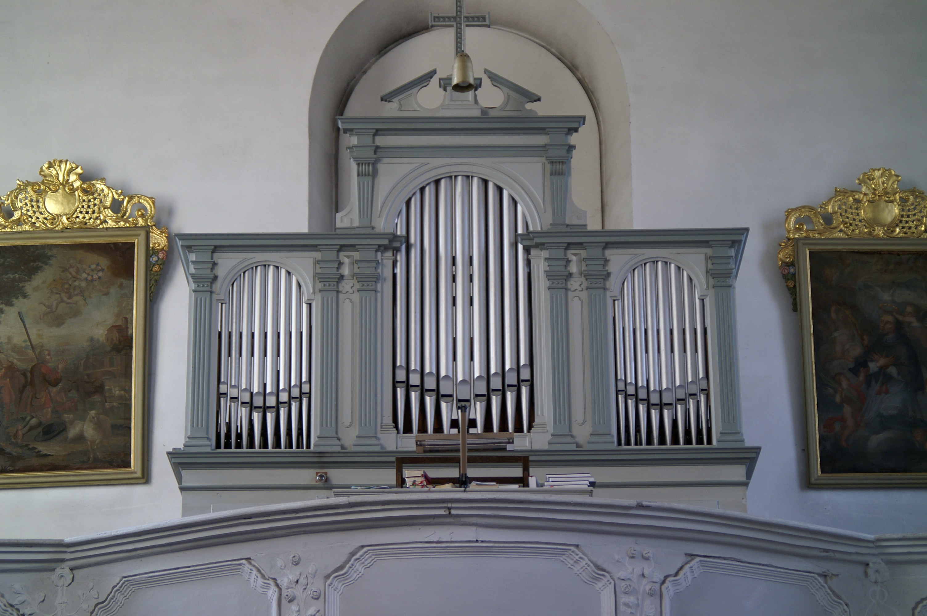 Orgel von Regensburg-Dechbetten, erbaut von Bittner, Nürnberg